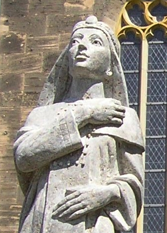 Statue der Kaiserin Theophanu vor der Marktkirche in Eschwege, Hessen, Deutschland (Detail)